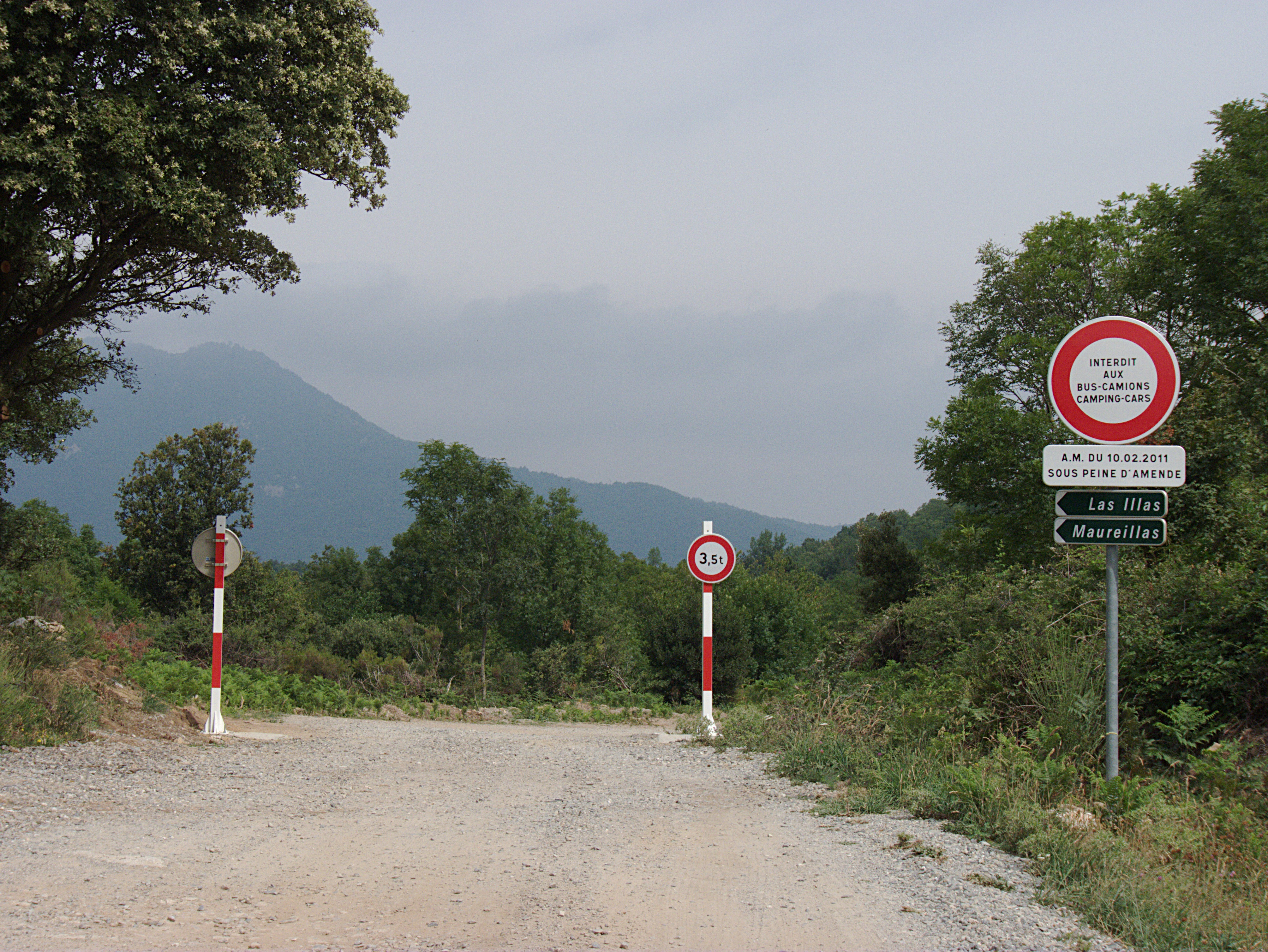 Col de Manrella, Maureillas-La-Illas (Pyrénées-Orientales, Languedoc-Roussillon, France), Agullana (Haut-Ampurdan, Gérone, Catalogne, Espagne)